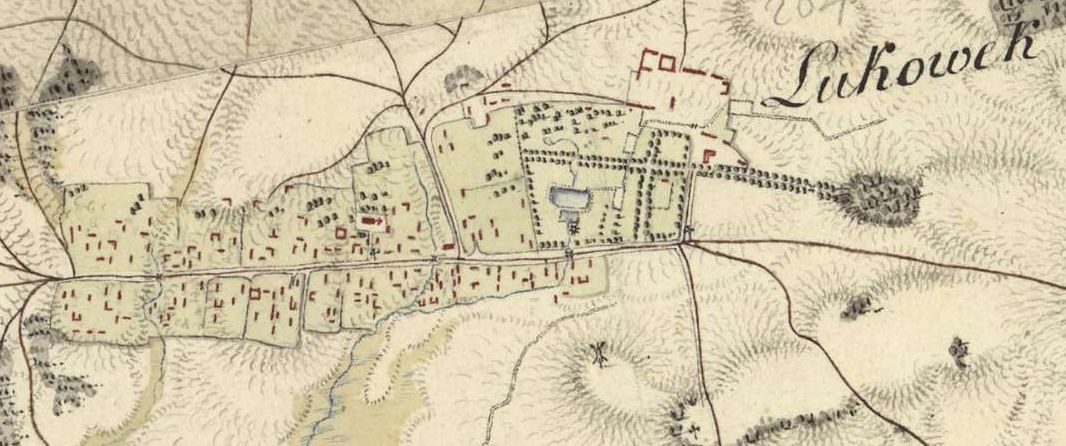 Łukówek (powiat chełmski) na mapie Galicji Zachodniej (Josephinische Landesuafnahme, ca. 1801-1804)